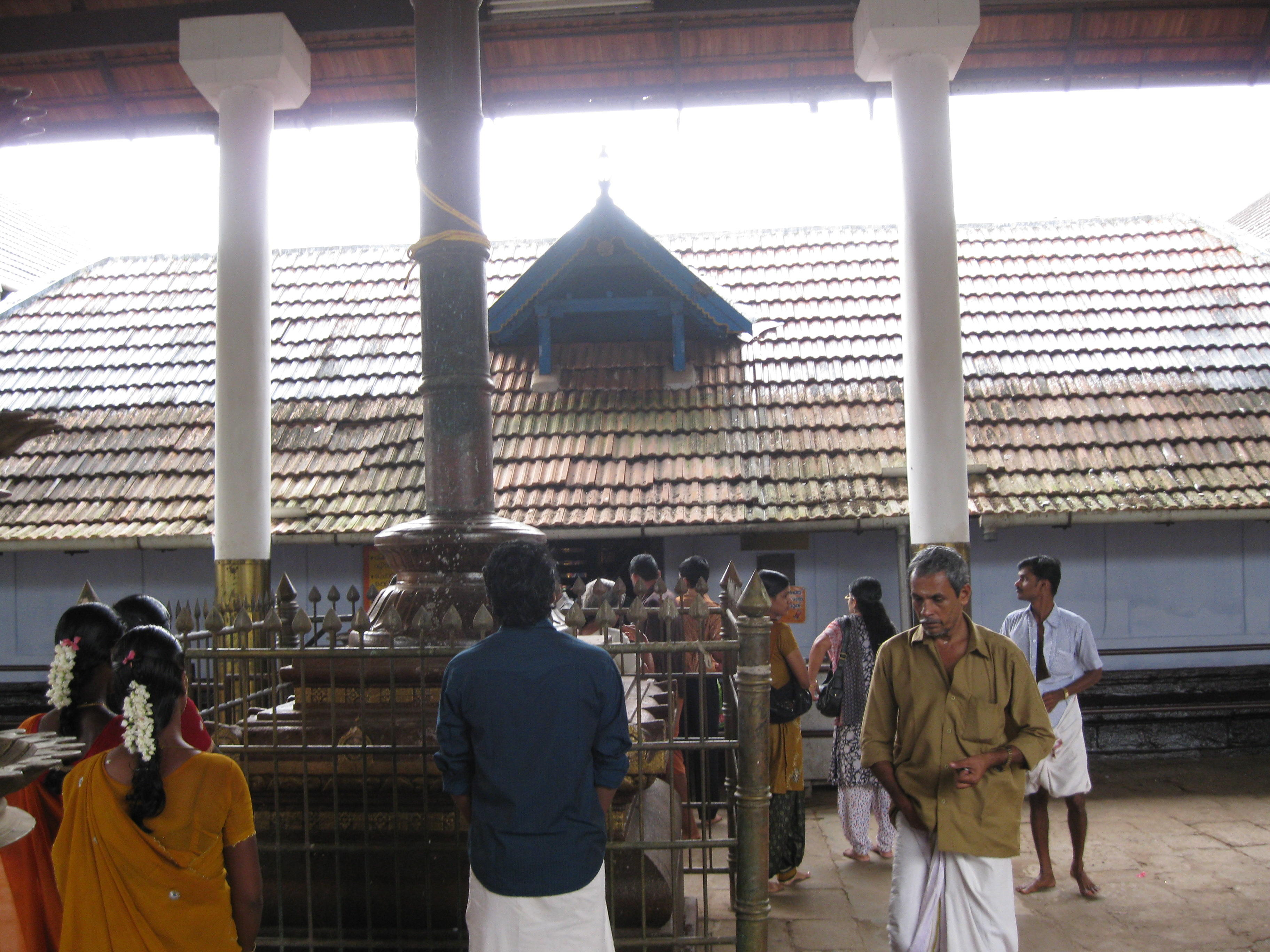 മാങ്ങോട്ട്കാവ് ക്ഷേത്രത്തിന്റെ വടക്കേനട